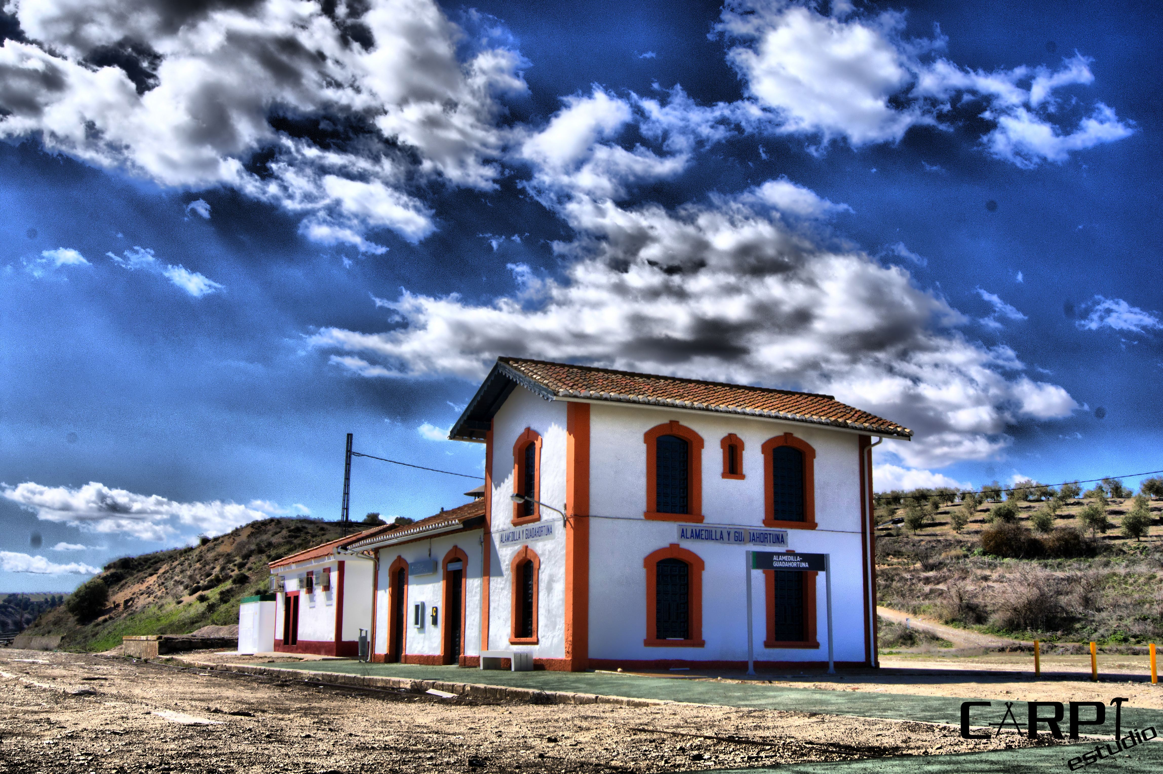 Estación de Alamedilla-Guadahortuna